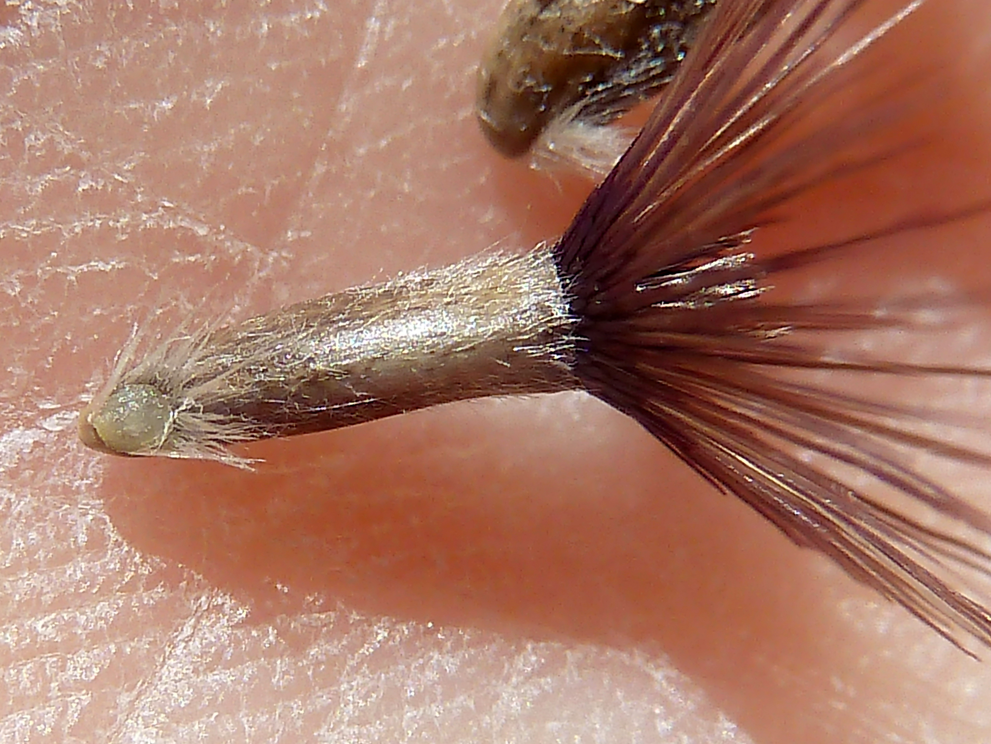 Centaurea saxicola - Detalle de una cipsela suelta pubescente con el hilo cárpico y el eleosoma rodeados de un penacho de pelos rígidos. También el vilano doble, con el interno mucho más corto que el externo - Cabezo de Pallarés, Albatera, Provincia de Alicante, España.